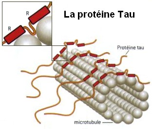 Rôle de Tau dans la cohésion des microtubules